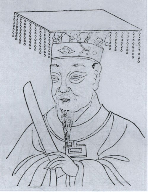 汉长沙王吴芮像。像取自诒安堂1929年《呉氏宗谱》。